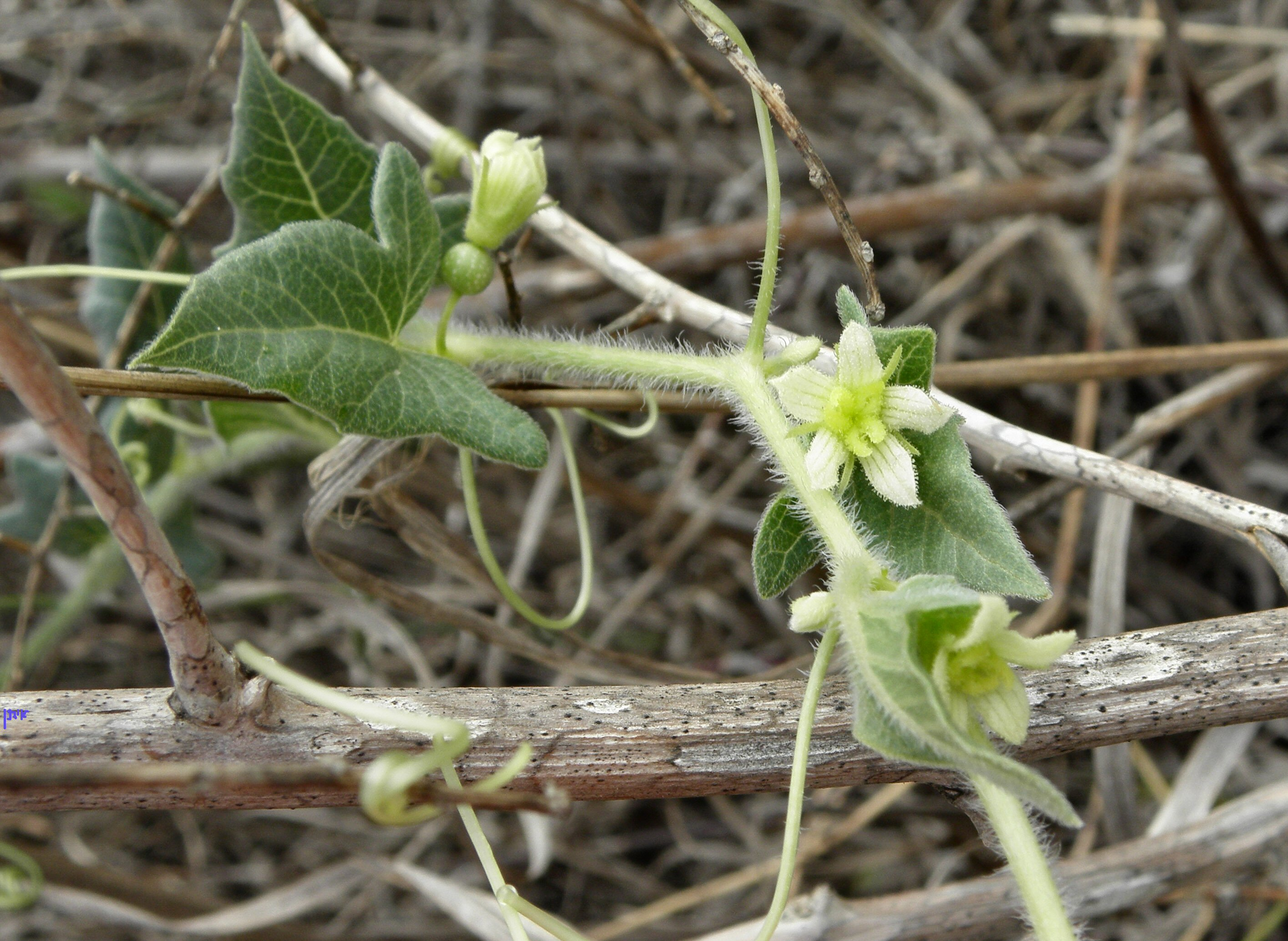 Bryonia syriaca, female plant דלעת-נחש סורית, צמח נקבי בפריחה